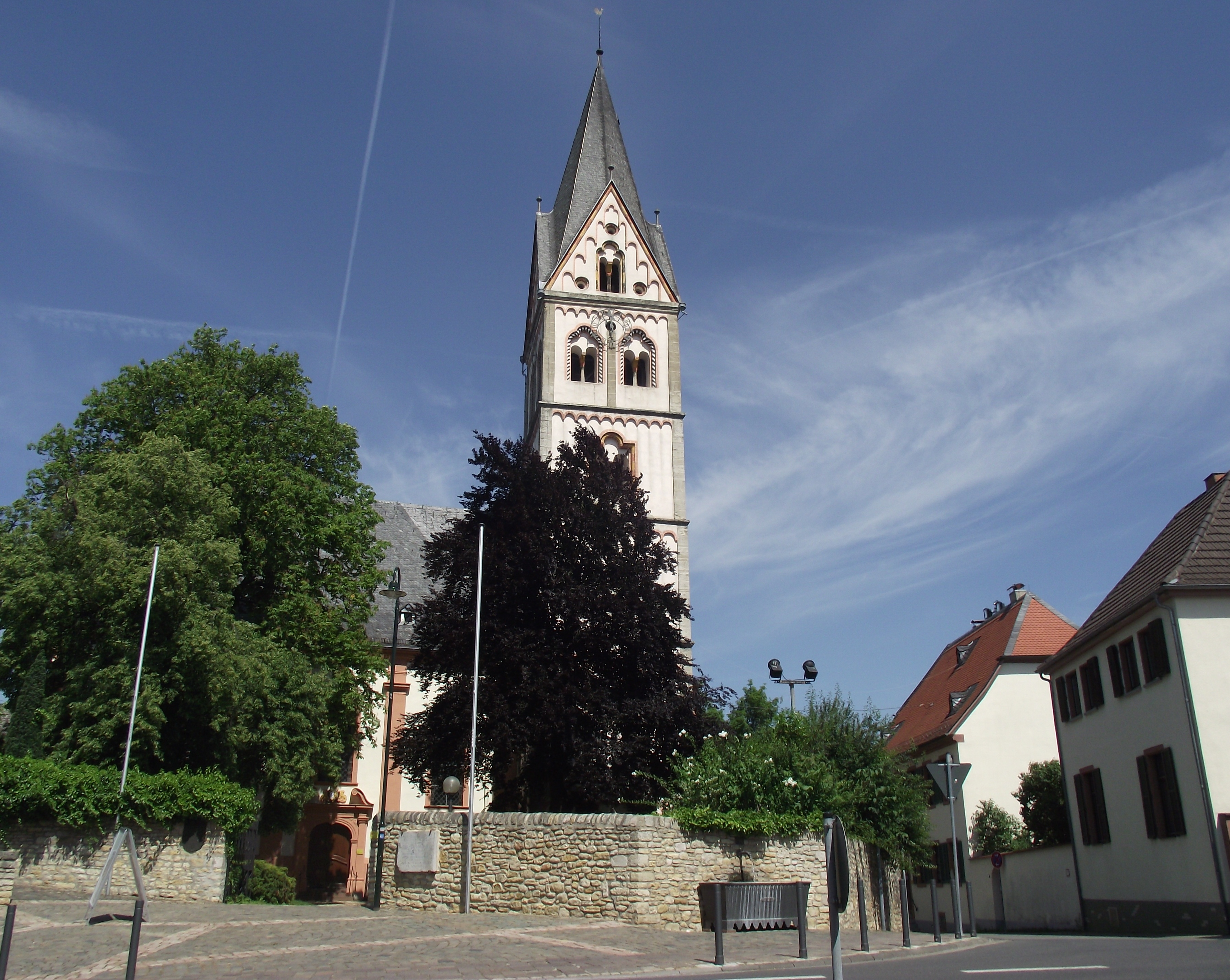 Südansicht St. Remigíus in Ingelheim, Mai 2012